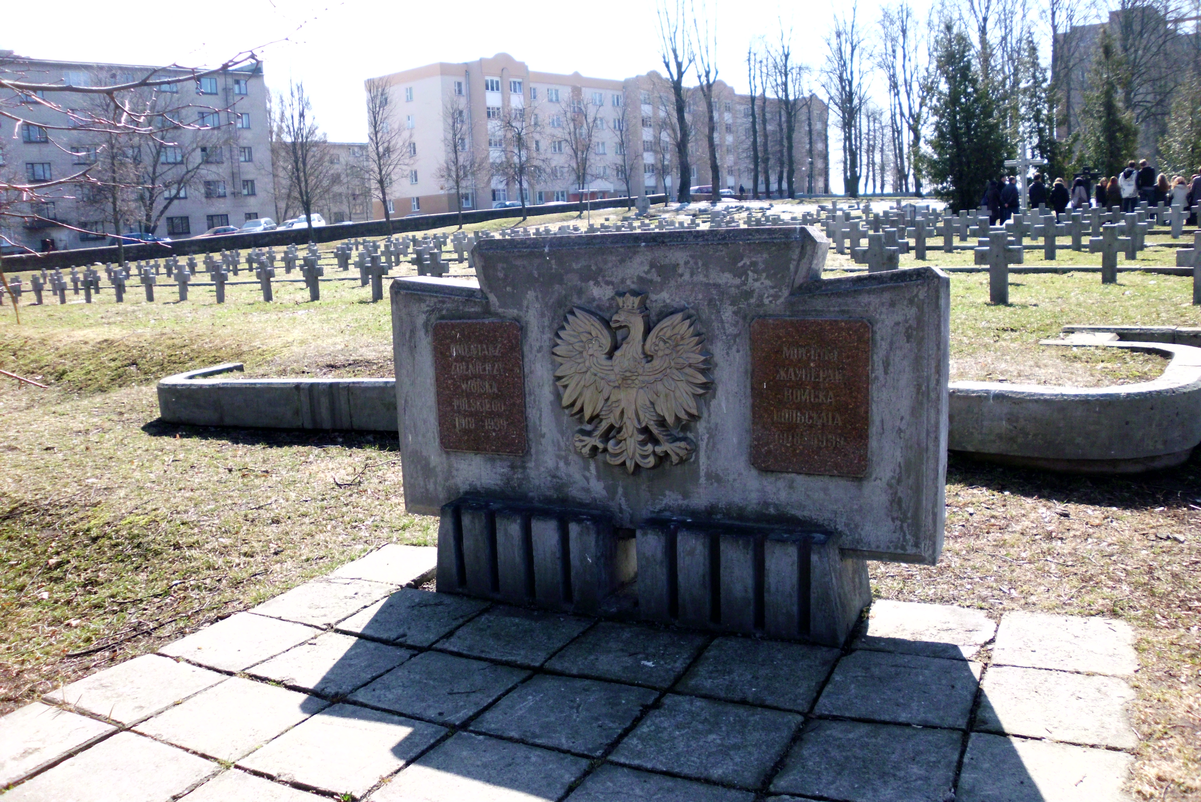 April 2013 Grodno